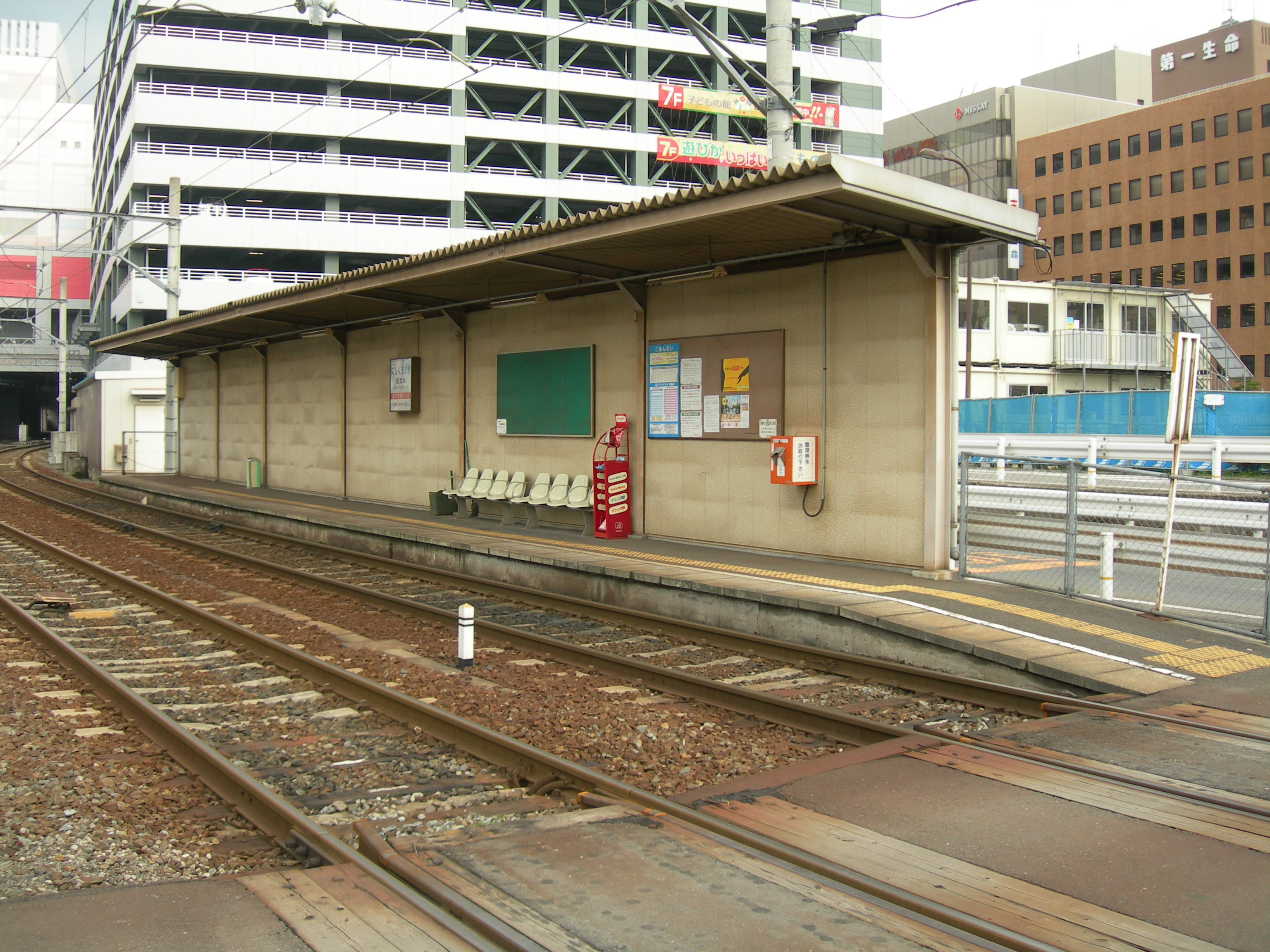 西黒崎駅